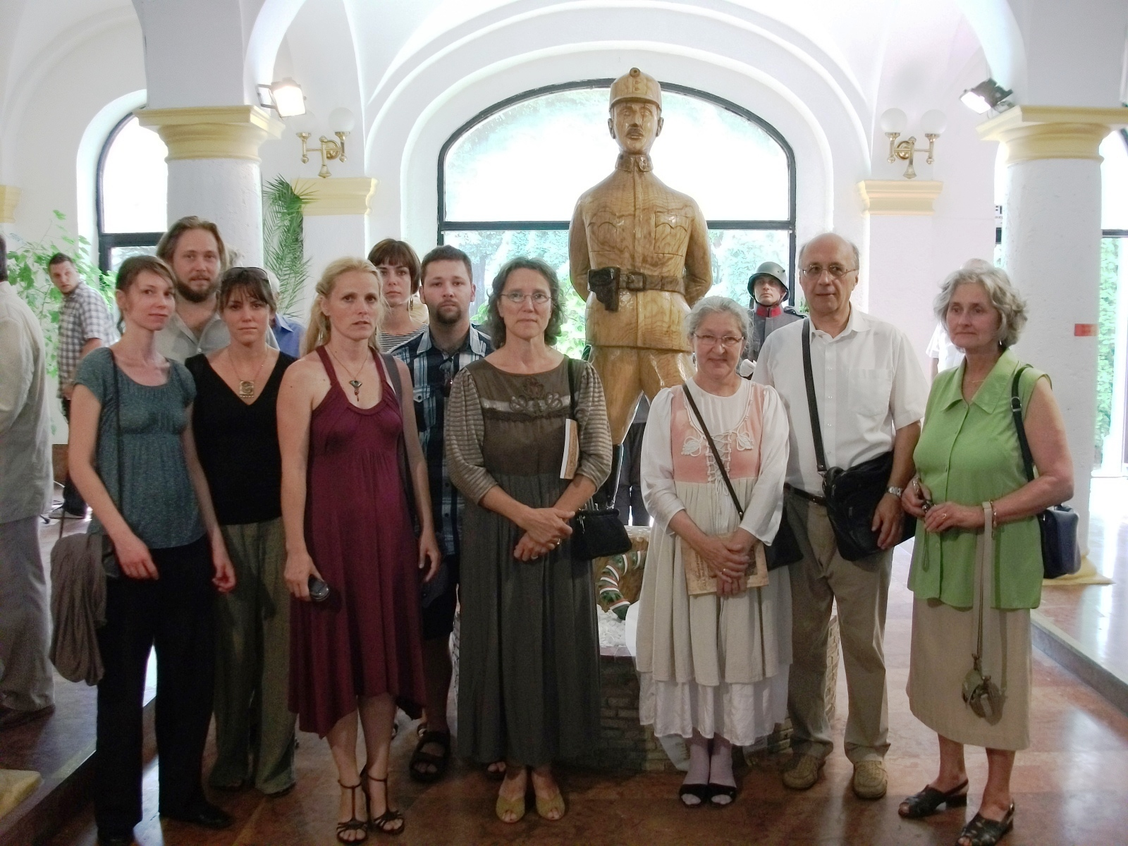 Sipos Gyula szobrának avatása Székesfehérváron, előtte Sipos Gyula két testvérének unokái, dédunokái